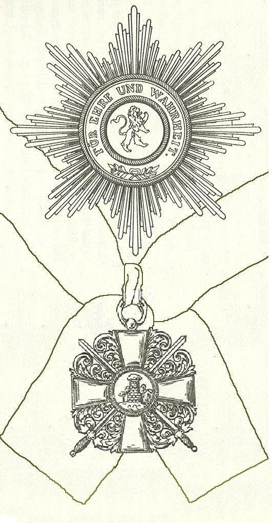 Eigen bewerking van een afbeelding uit 1893